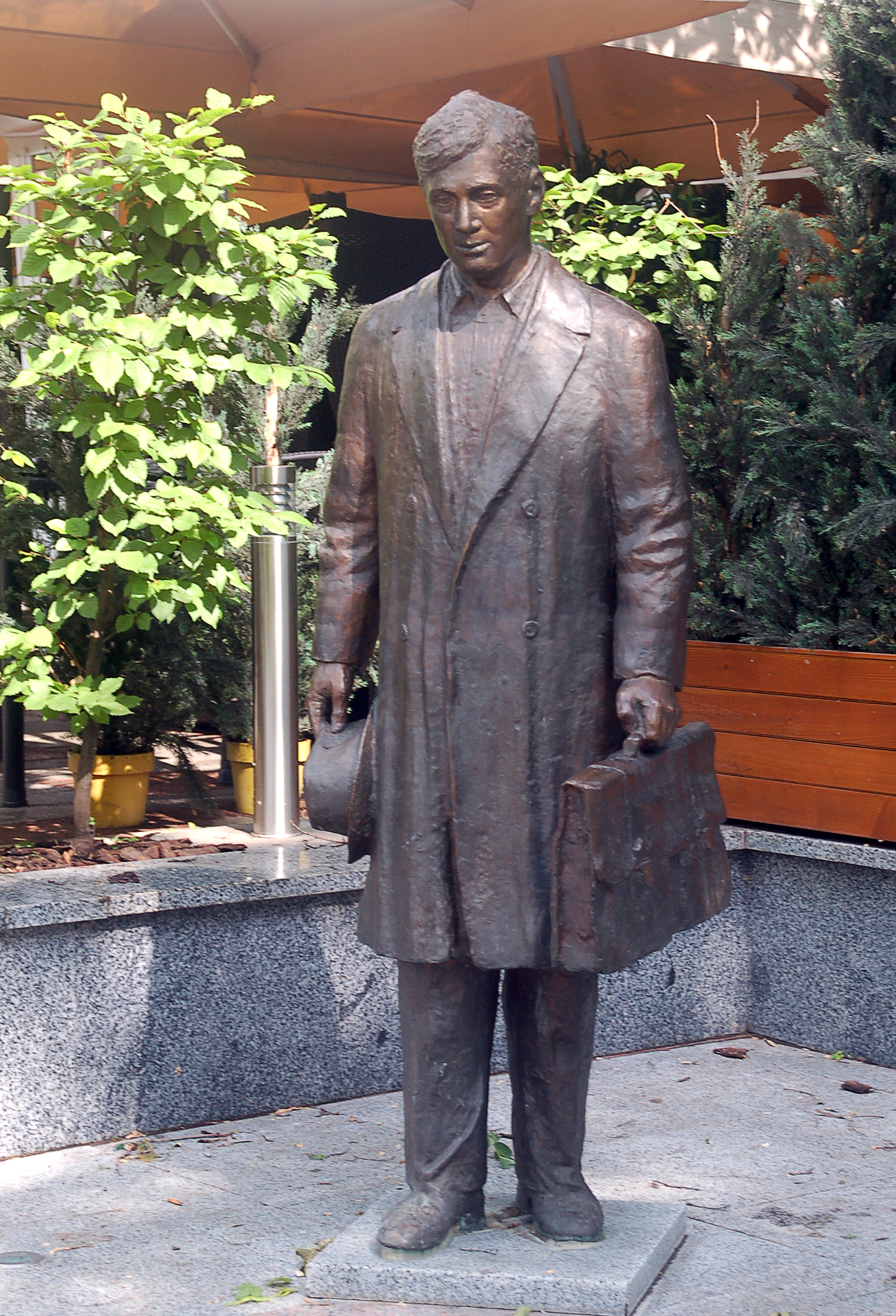 Юрий Деточкин (к/ф "Берегись автомобиля")